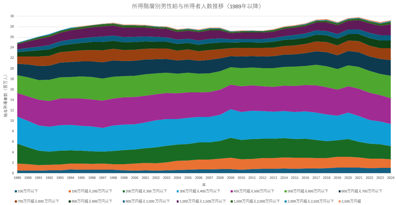 1989年以降の男性給与所得者の所得階層別人数推移